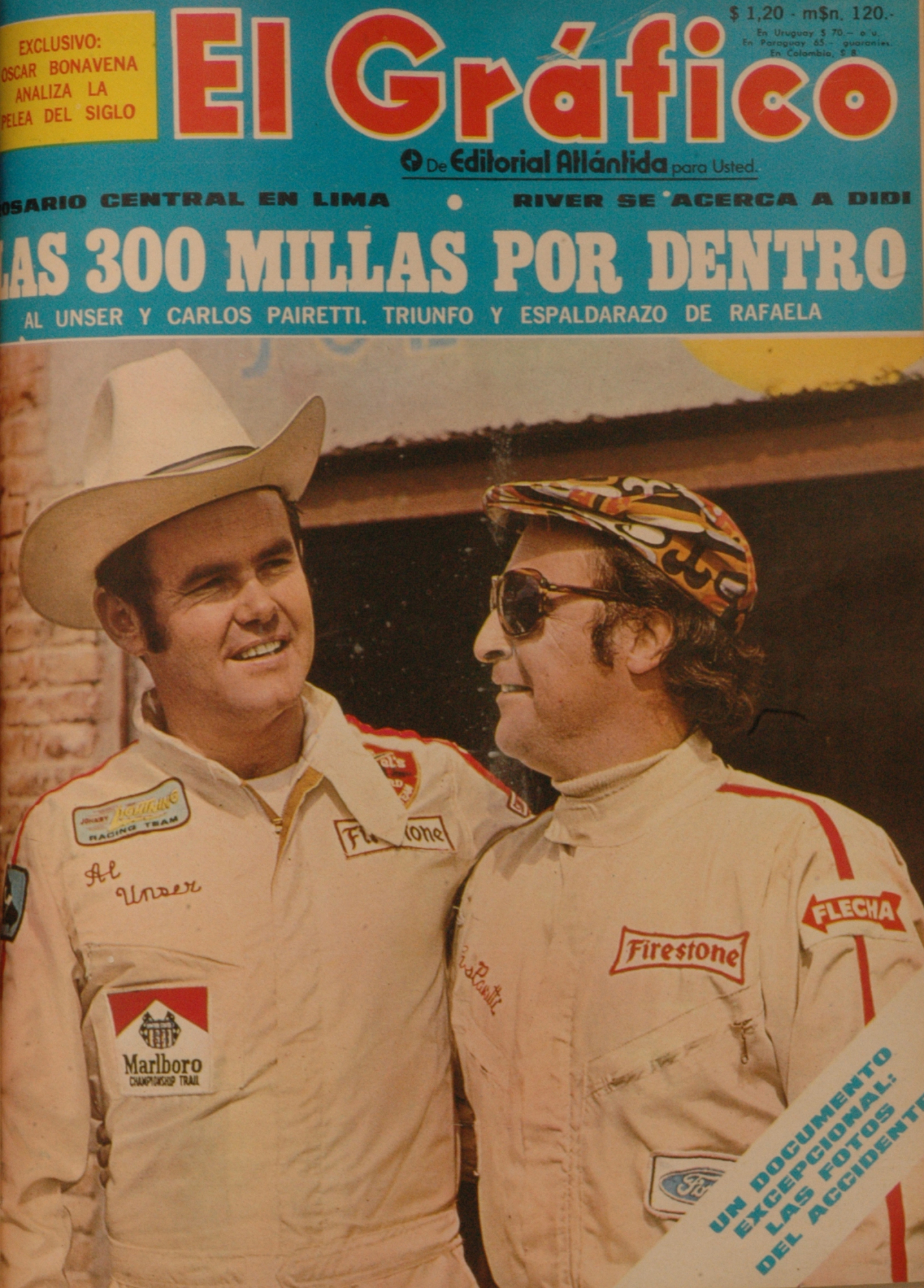 El Grafico del 02 de Marzo de 1971. Edicion 2682